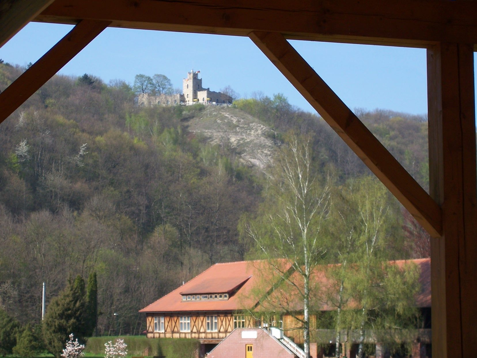 Bad Sulza, Blick aus dem Kurpark auf die Sonnenburg